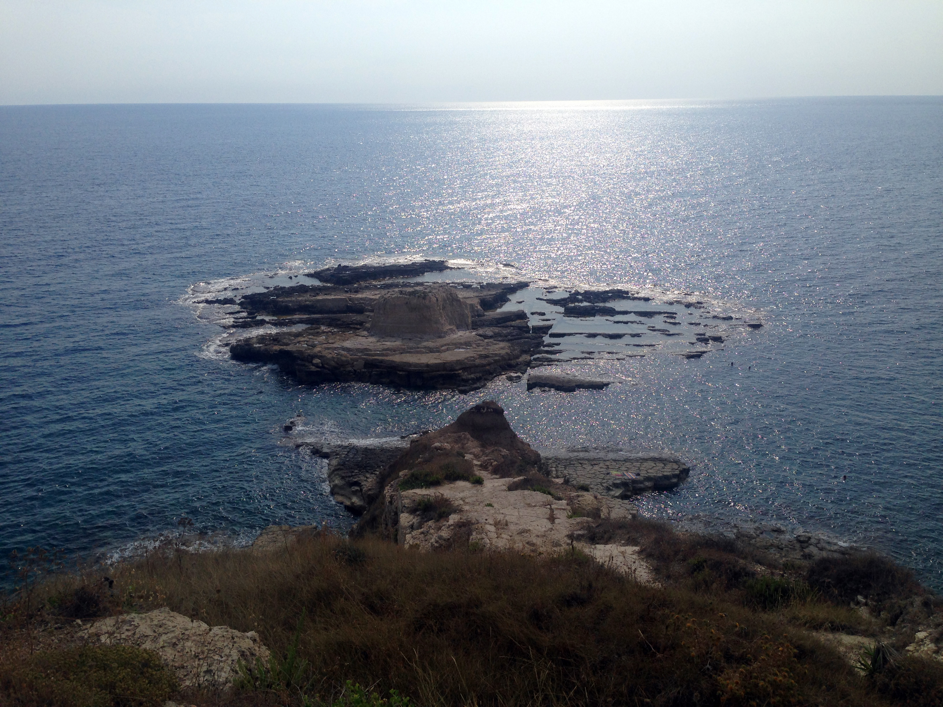 Lo Sbarcatore dei Turchi dall'alto